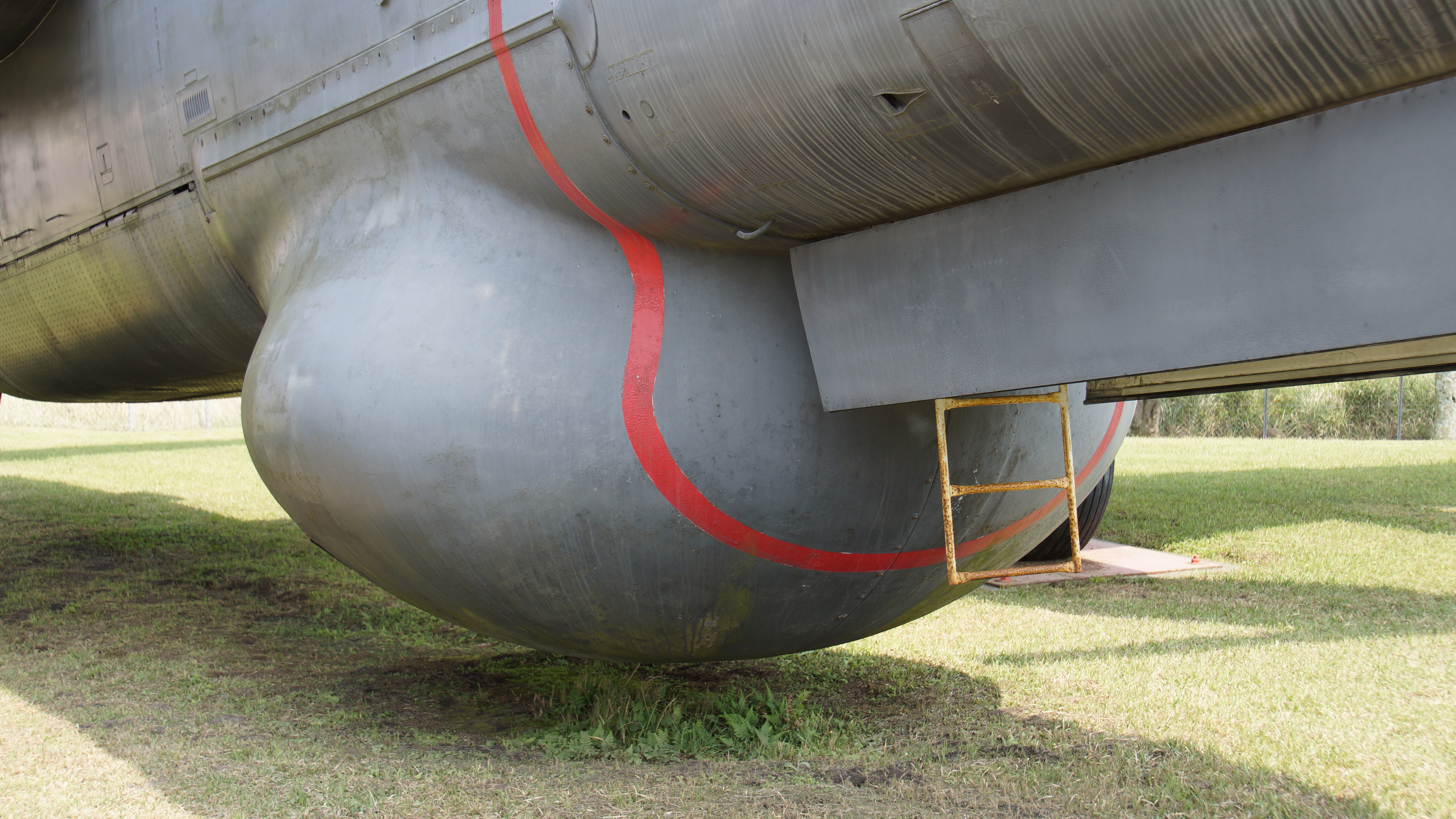 海上自衛隊 P-2V-7対潜哨戒機（4618号機） 胴体下APS-20Eレーダー用レドーム 右前面。2017年4月29日 海上自衛隊鹿屋航空基地史料館にて。